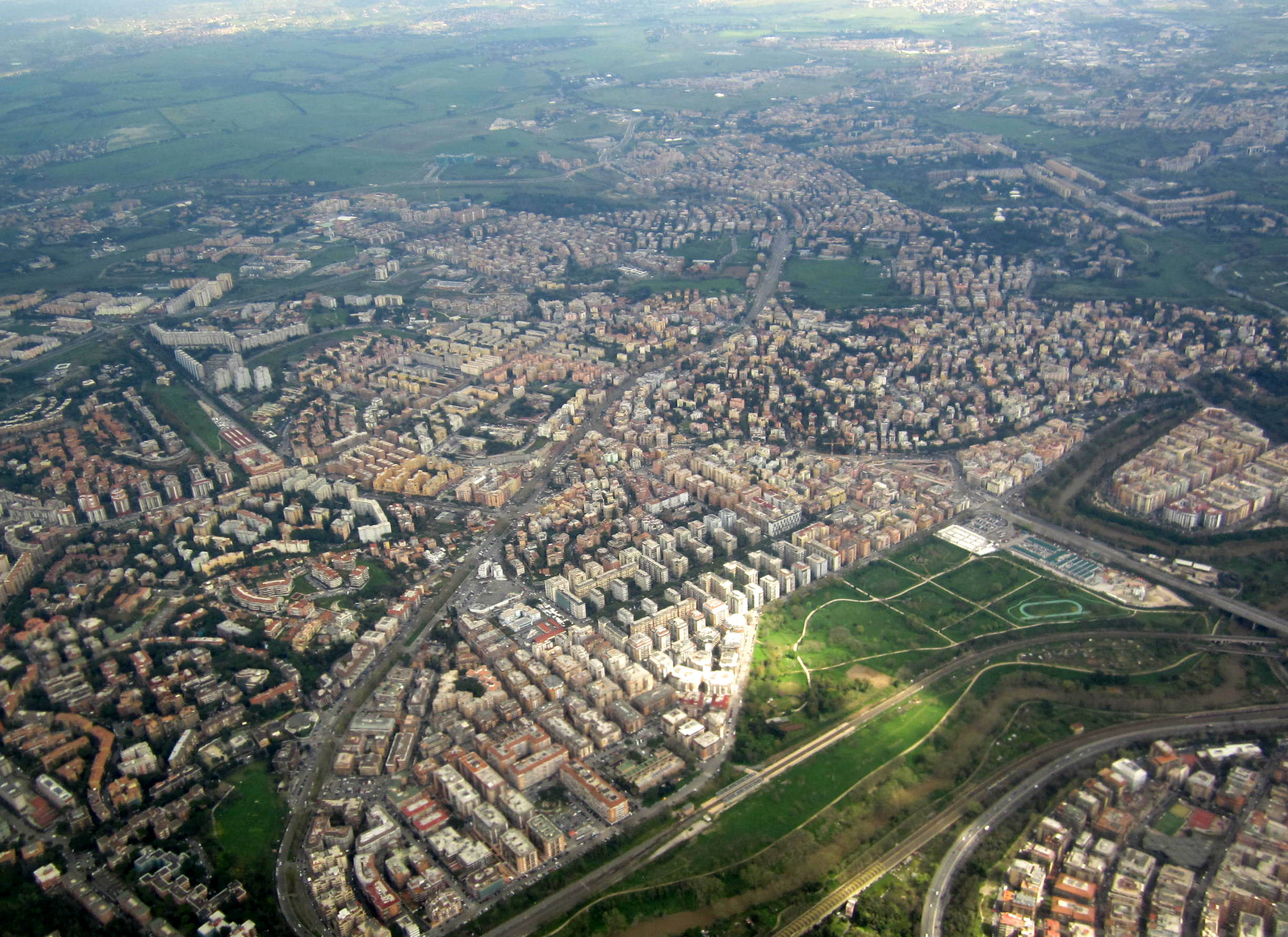 Veduta aerea del quartiere romano Monte Sacro